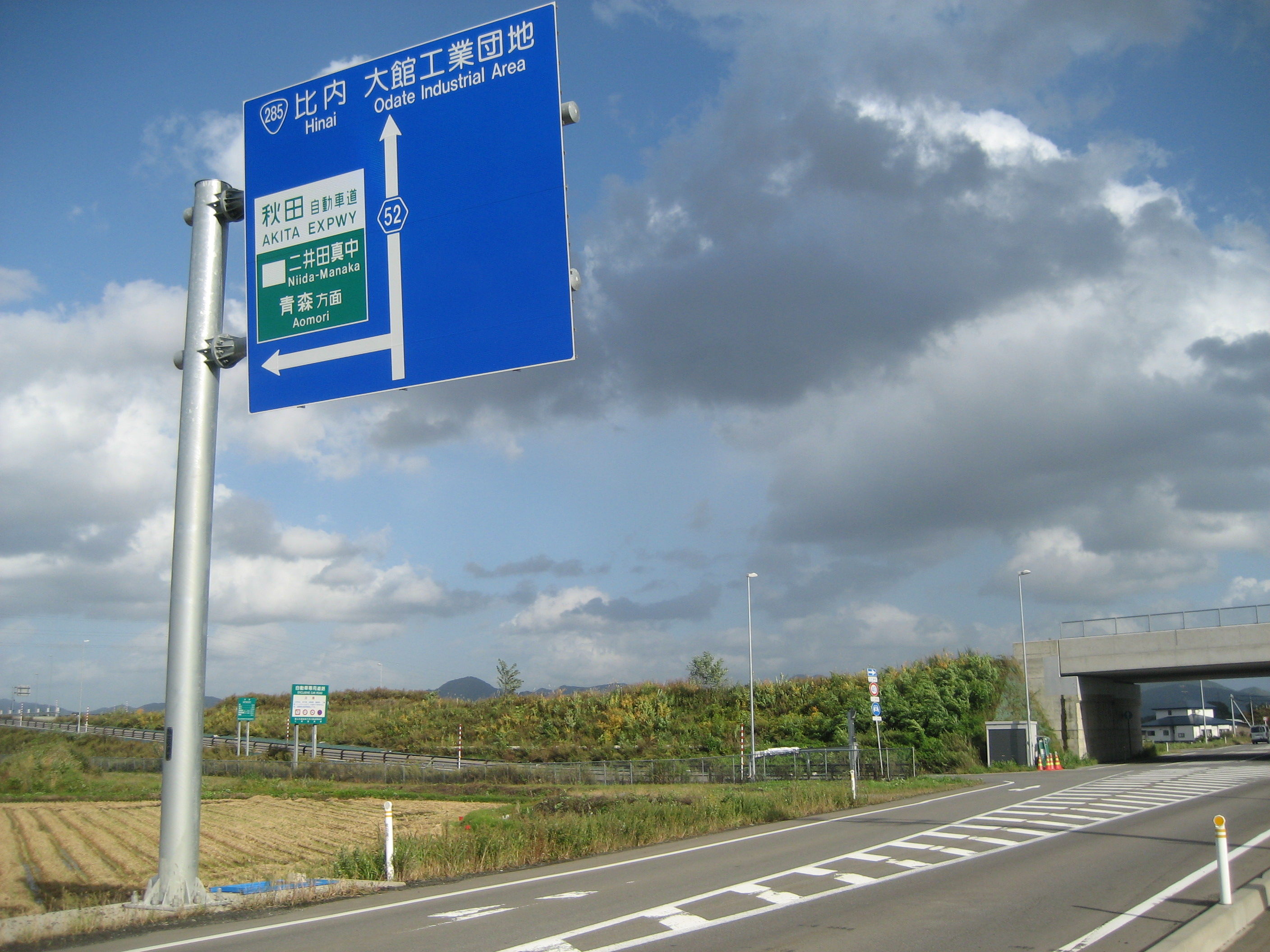 秋田自動車道二井田真中インターチェンジ